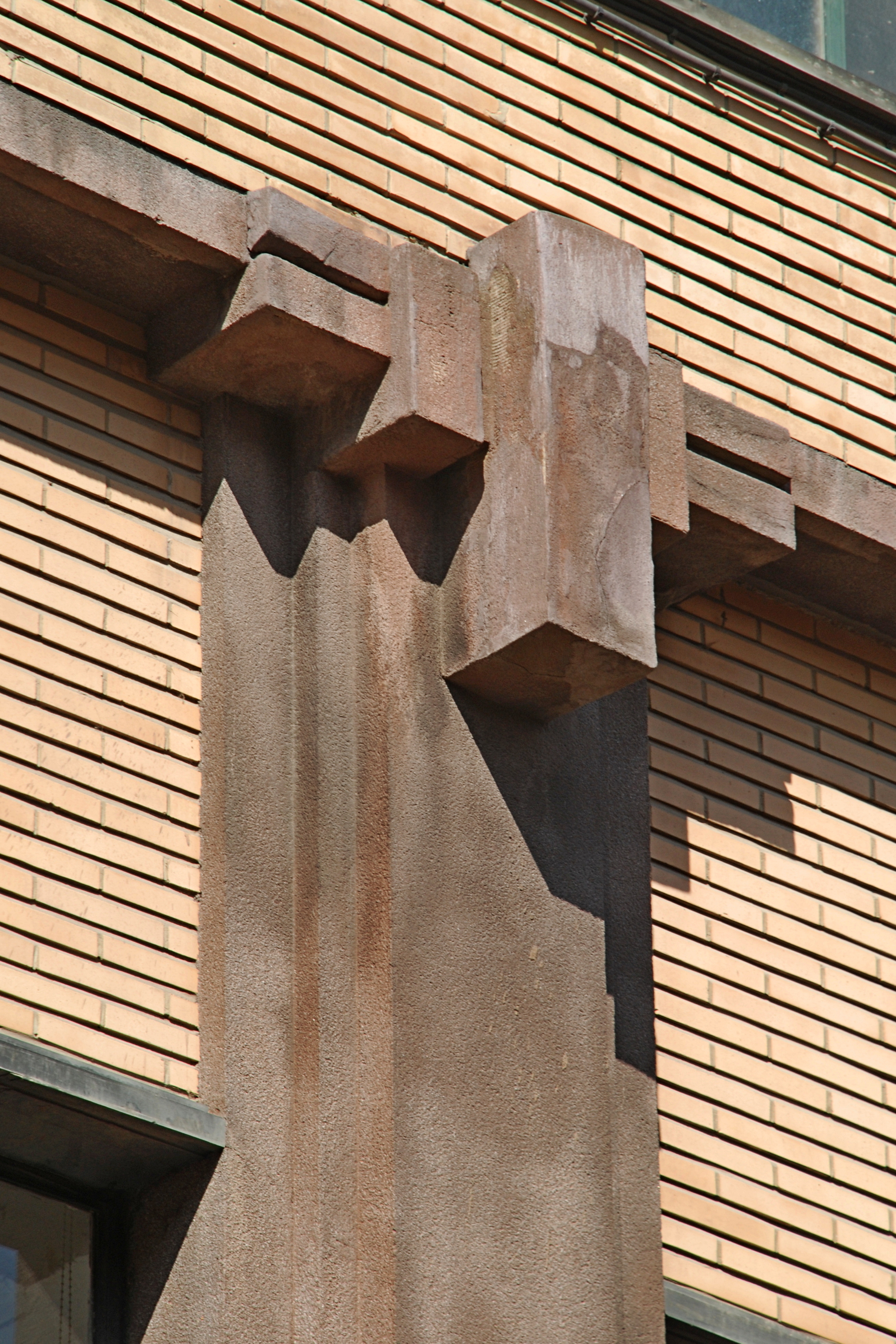 Belgique - Bruxelles - Magnéto Belge (Art déco - architecte Léon Guiannotte - 1941-1942 - rue Marconi 121-127 à Forest )